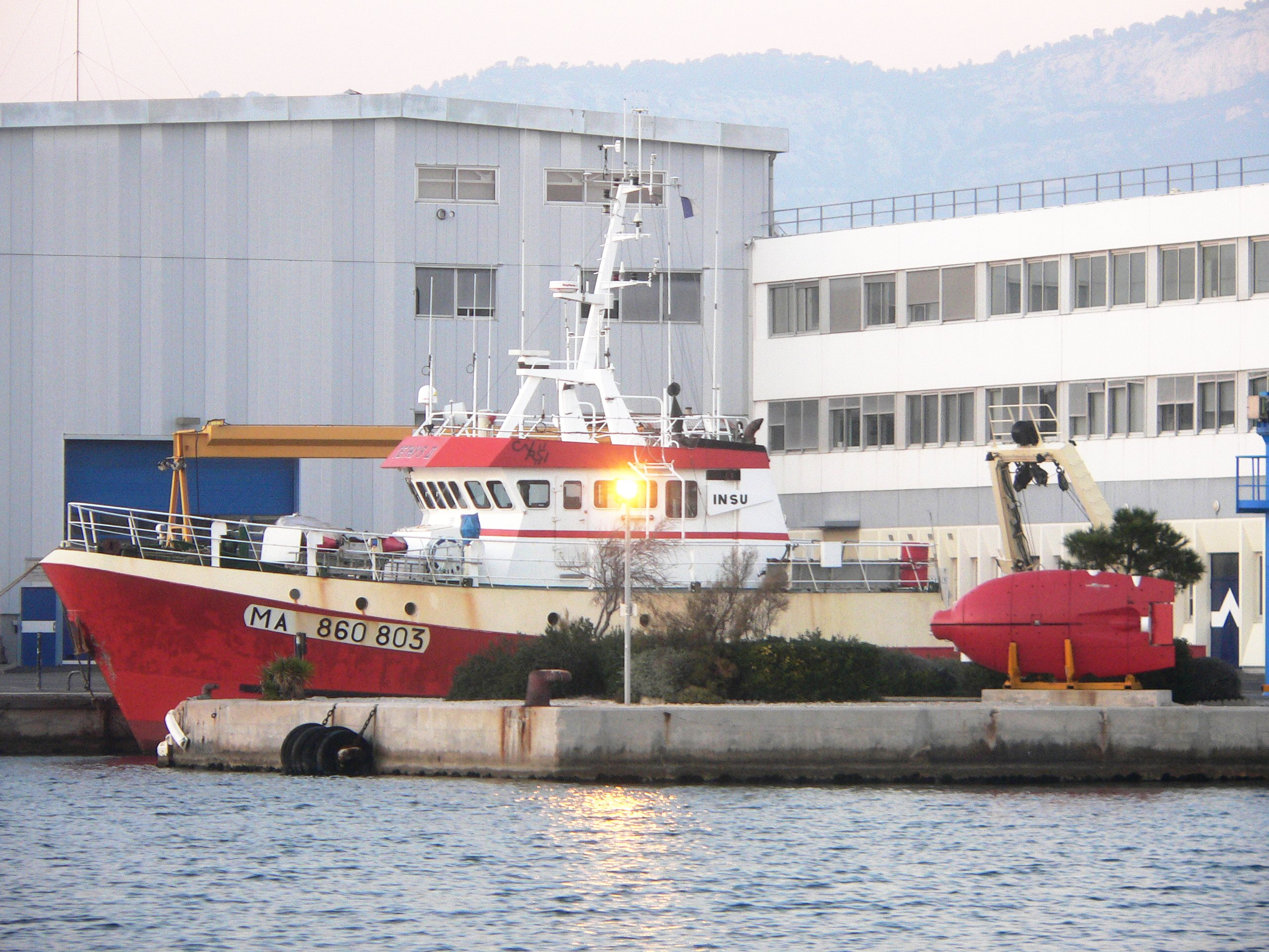 Théthys II, navire de façade de la flotte méditerranéenne de la division technique de l'Institut national des sciences de l'Univers (INSU-CNRS), dans le port de la Seyne-sur-Mer en 2006 IMO number:9066007